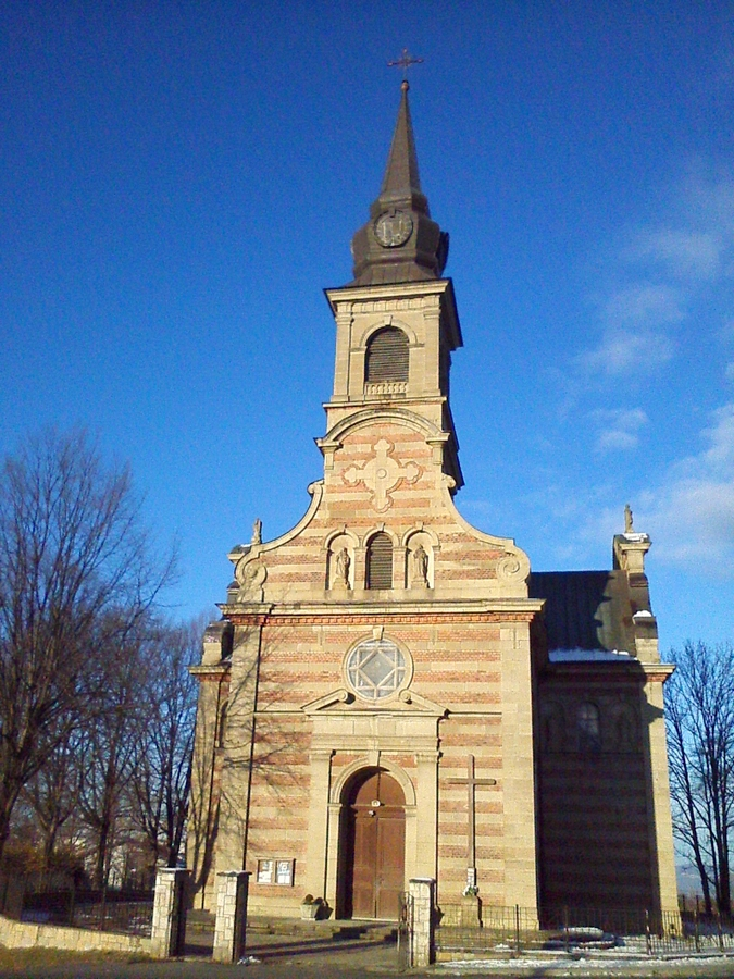 Wygląd kościoła parafialnego w Mystkowie w 2014 r.